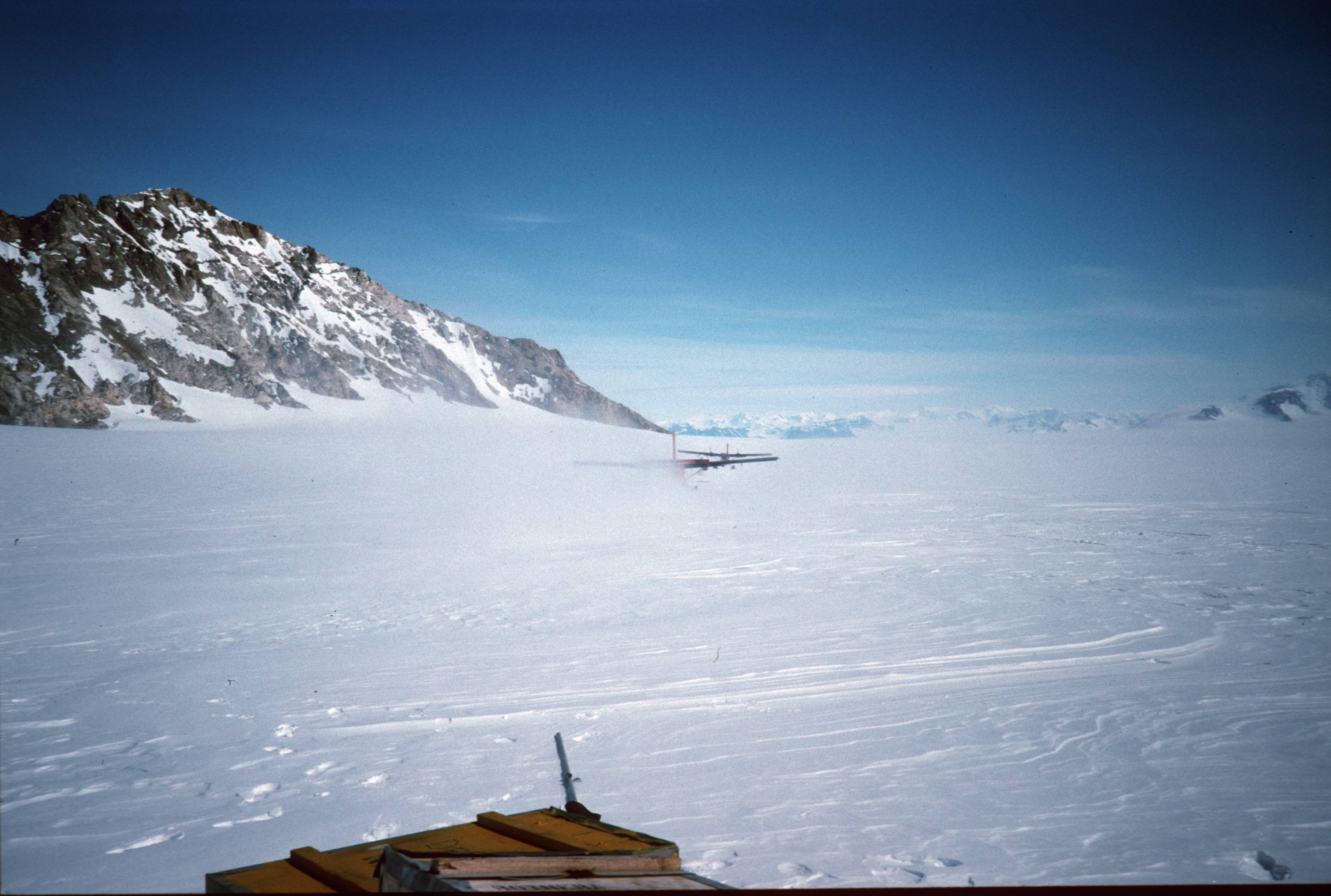 Twin Otters landing